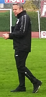 Markus Mattes, Cheftrainer des VfB Eichstätt